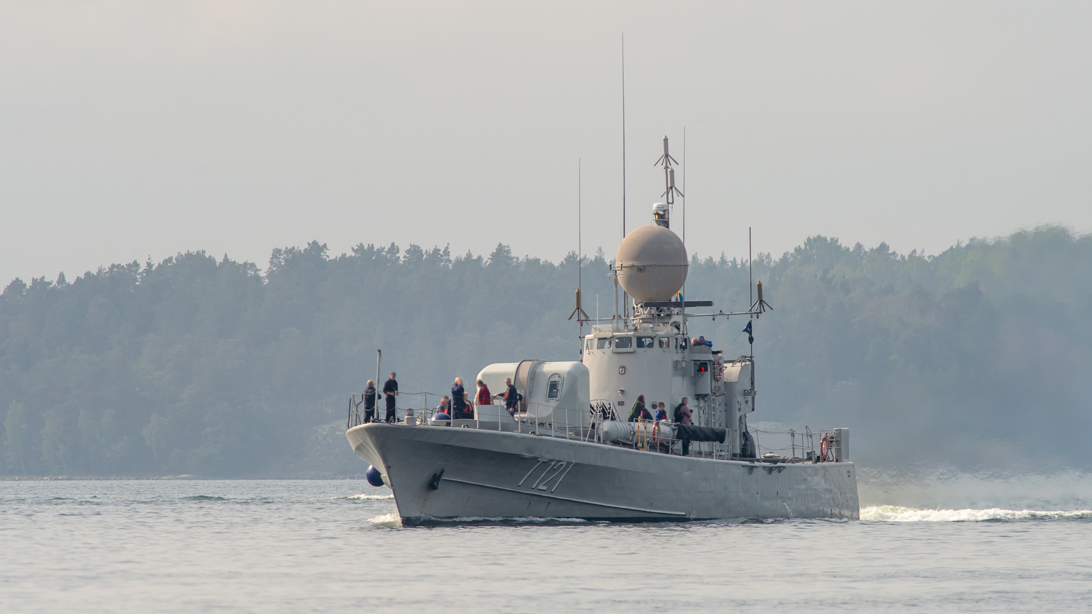 Spica (T121) (1966) This is an image of a protected Swedish ship, with call sign SHBF .